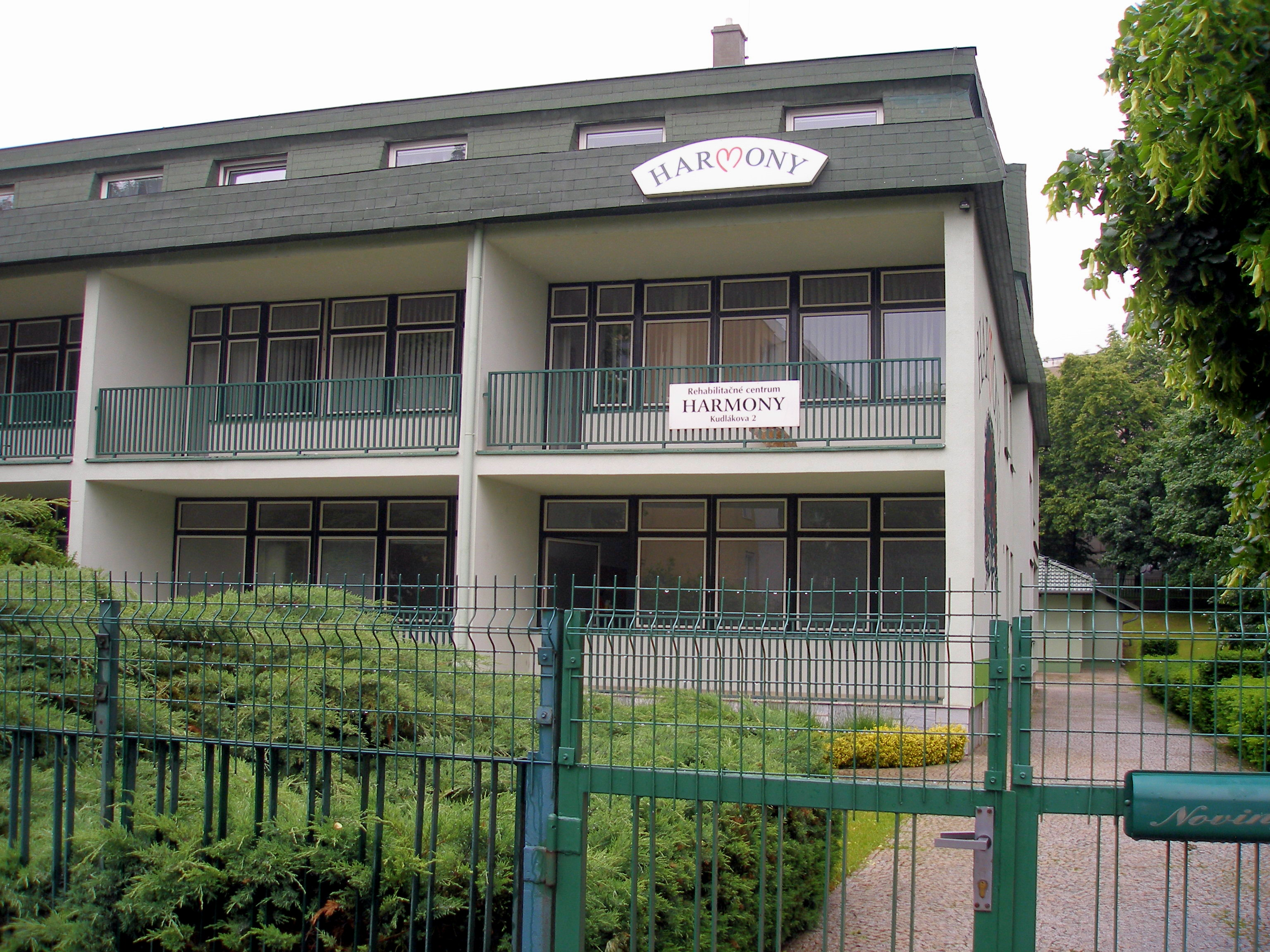 Bratislava hlavné mesto Slovenskej republiky.